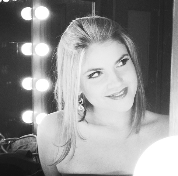 Linda Garcia tv Host Dominicana